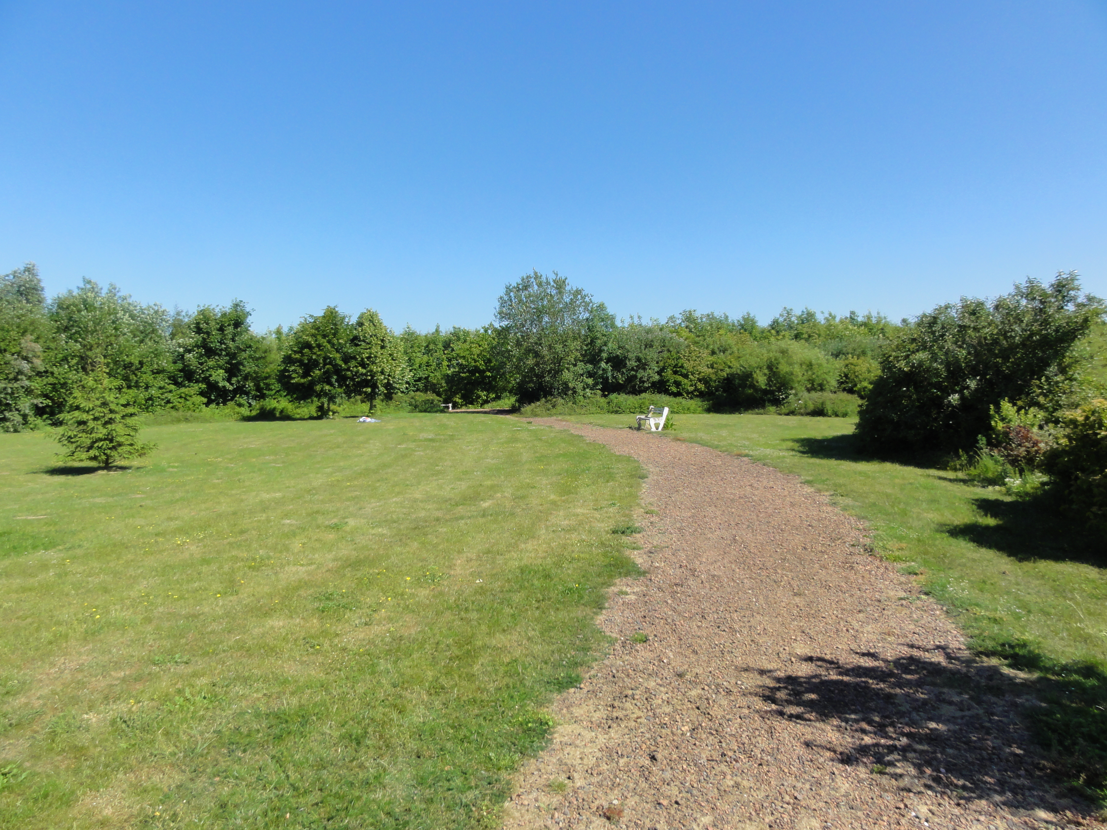 Terril n° 226A dit Cavalier du 1 de Vimy, Fosse n° 1 - 1 bis de la Compagnie des mines de Vimy-Fresnoy, Vimy, Pas-de-Calais, Nord-Pas-de-Calais, France.